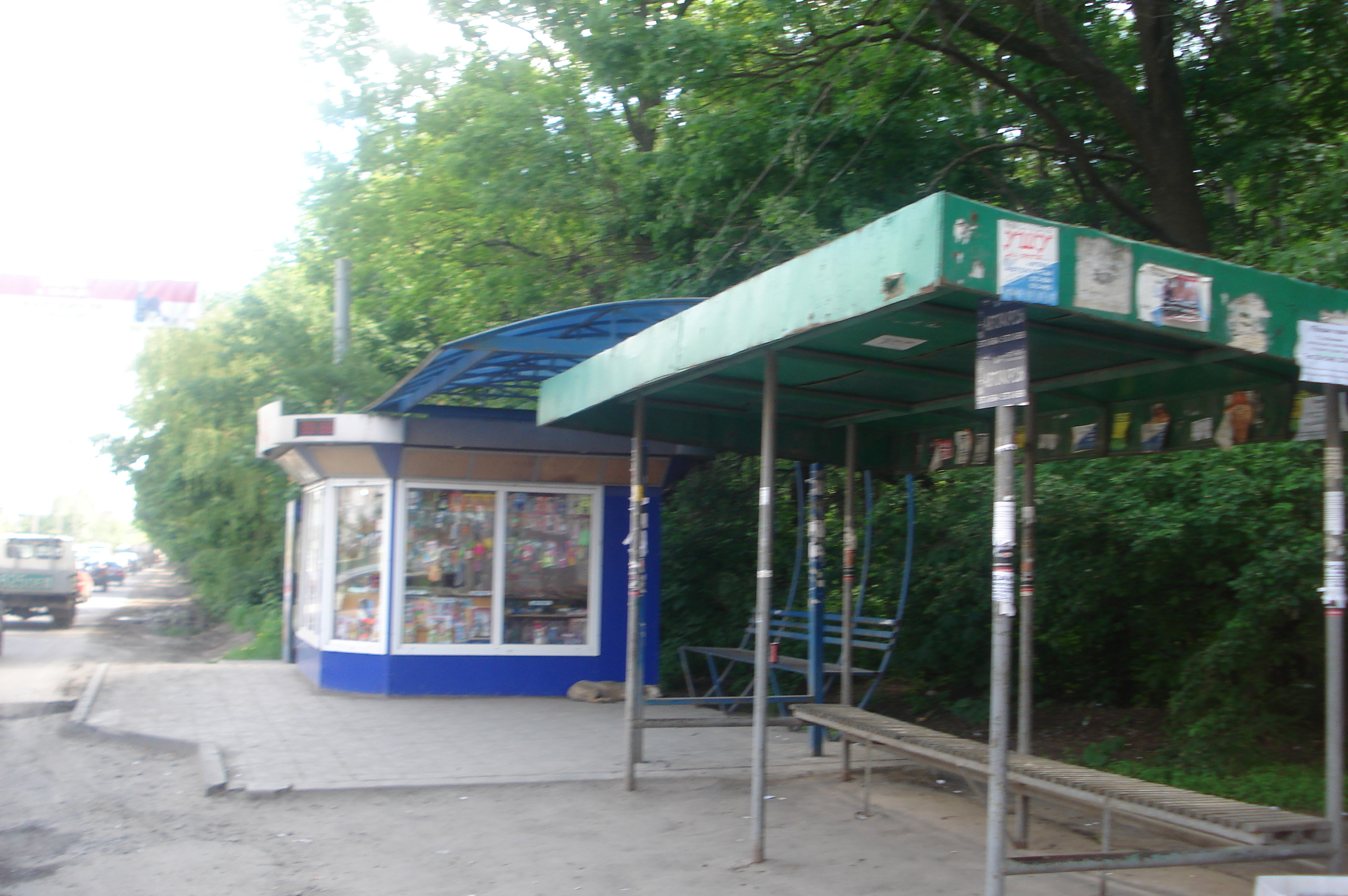 Остановка "Институт Генетики" в Воронеже, где 19 июля 2004 года прогремел взрыв